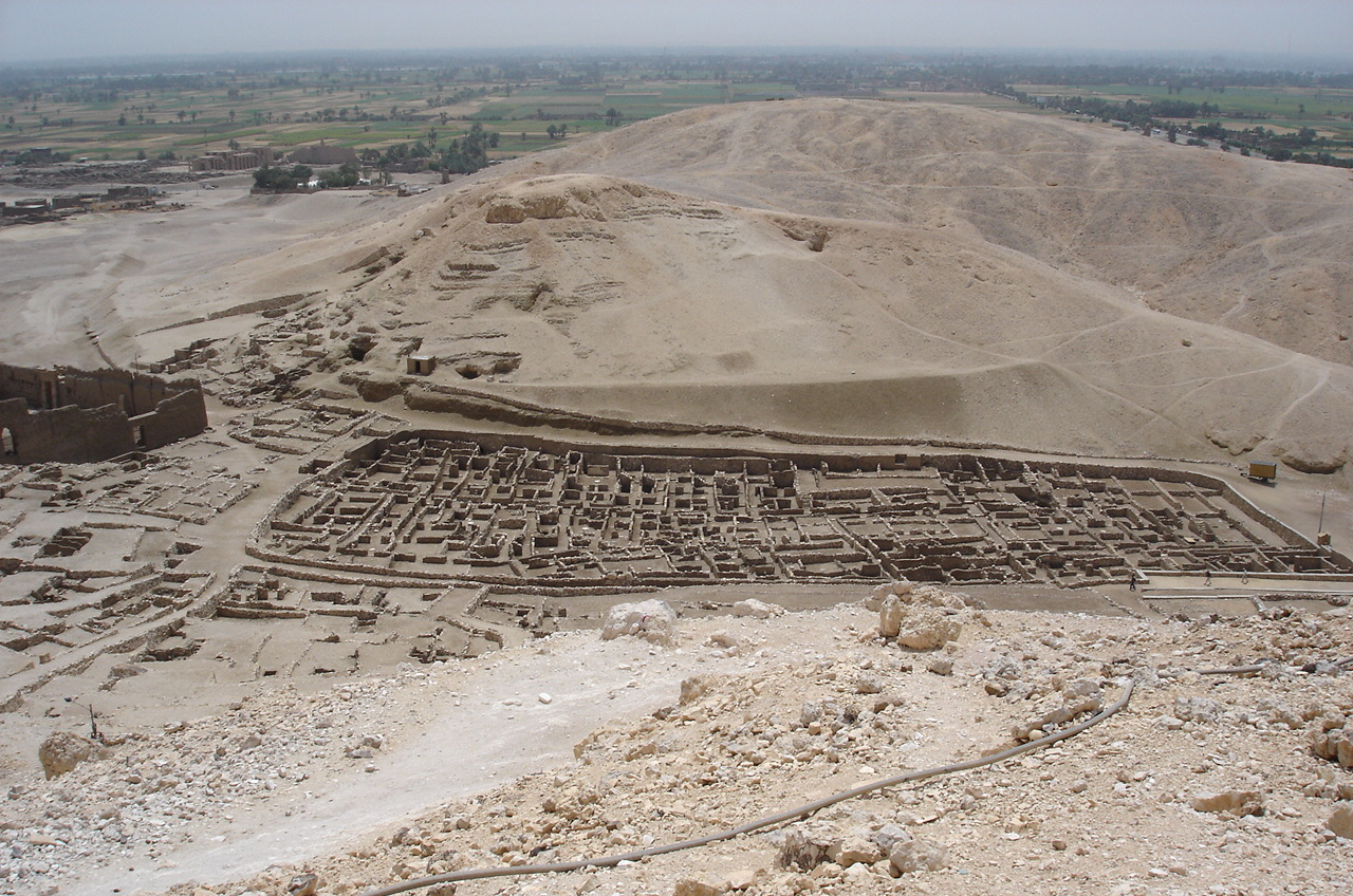 Dejr el-Medine (Luxor, Egyiptom)